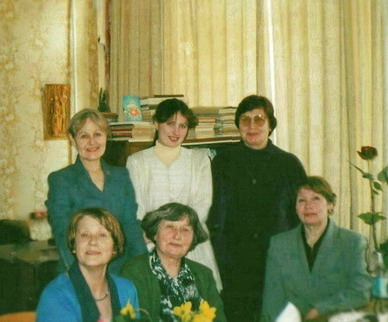 Беларуская (тарашкевіца): Навукова-метадычны цэнтр "Слоўнік", МДЛУ